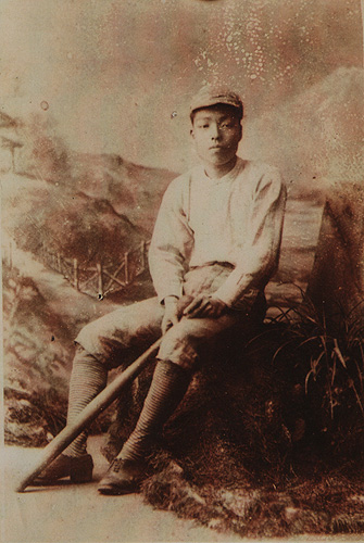 野球ユニフォーム姿の正岡子規